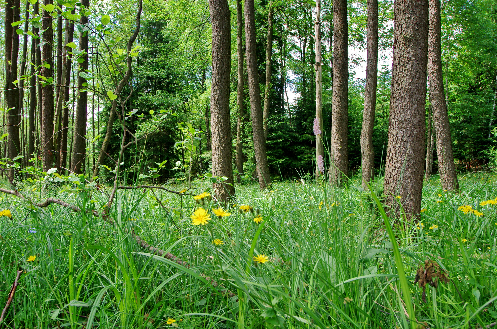 Evropsky významná lokalita Štítarský rybník, okres Cheb